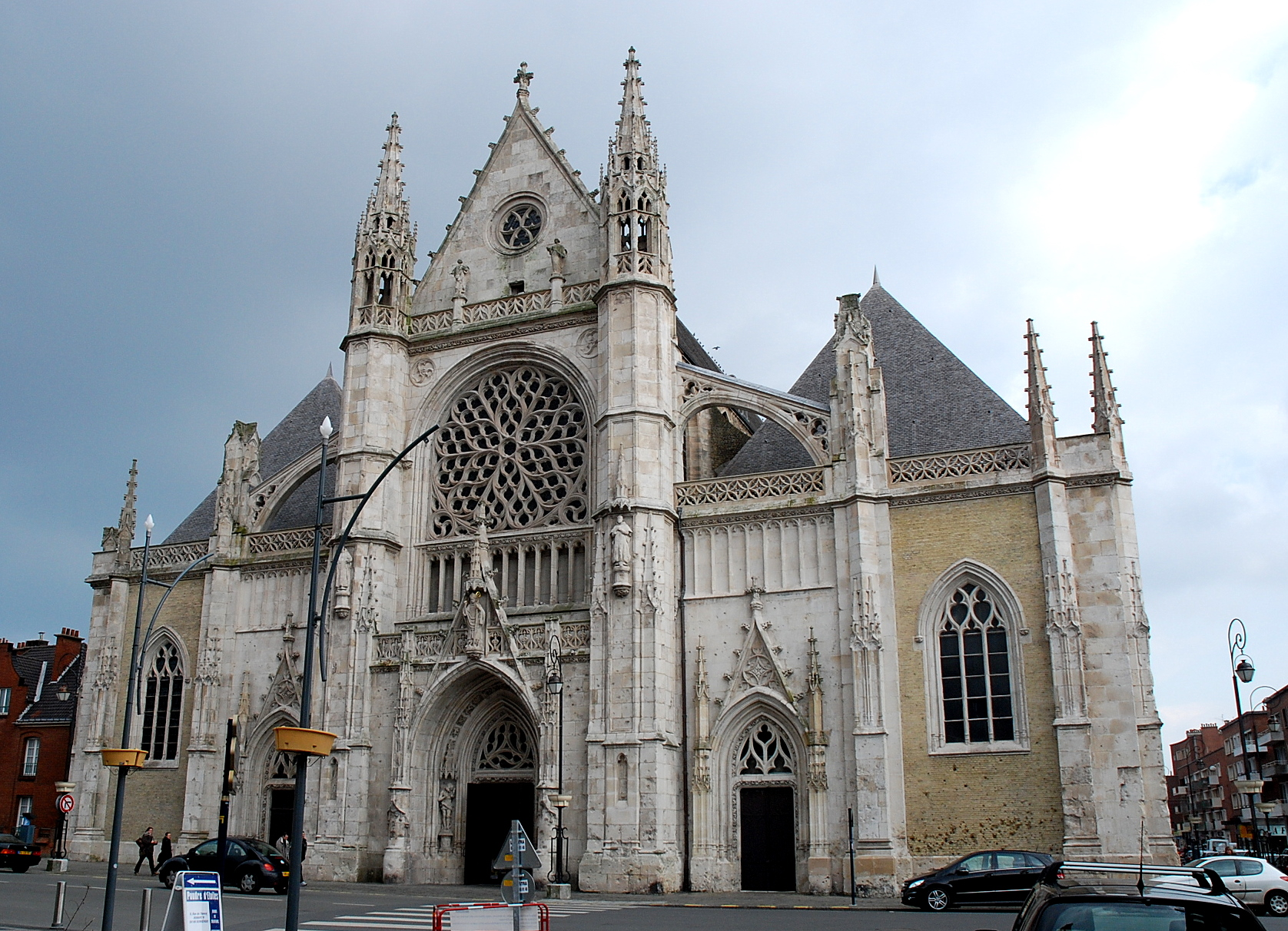 Eglise Saint Eloi à Dunkerque